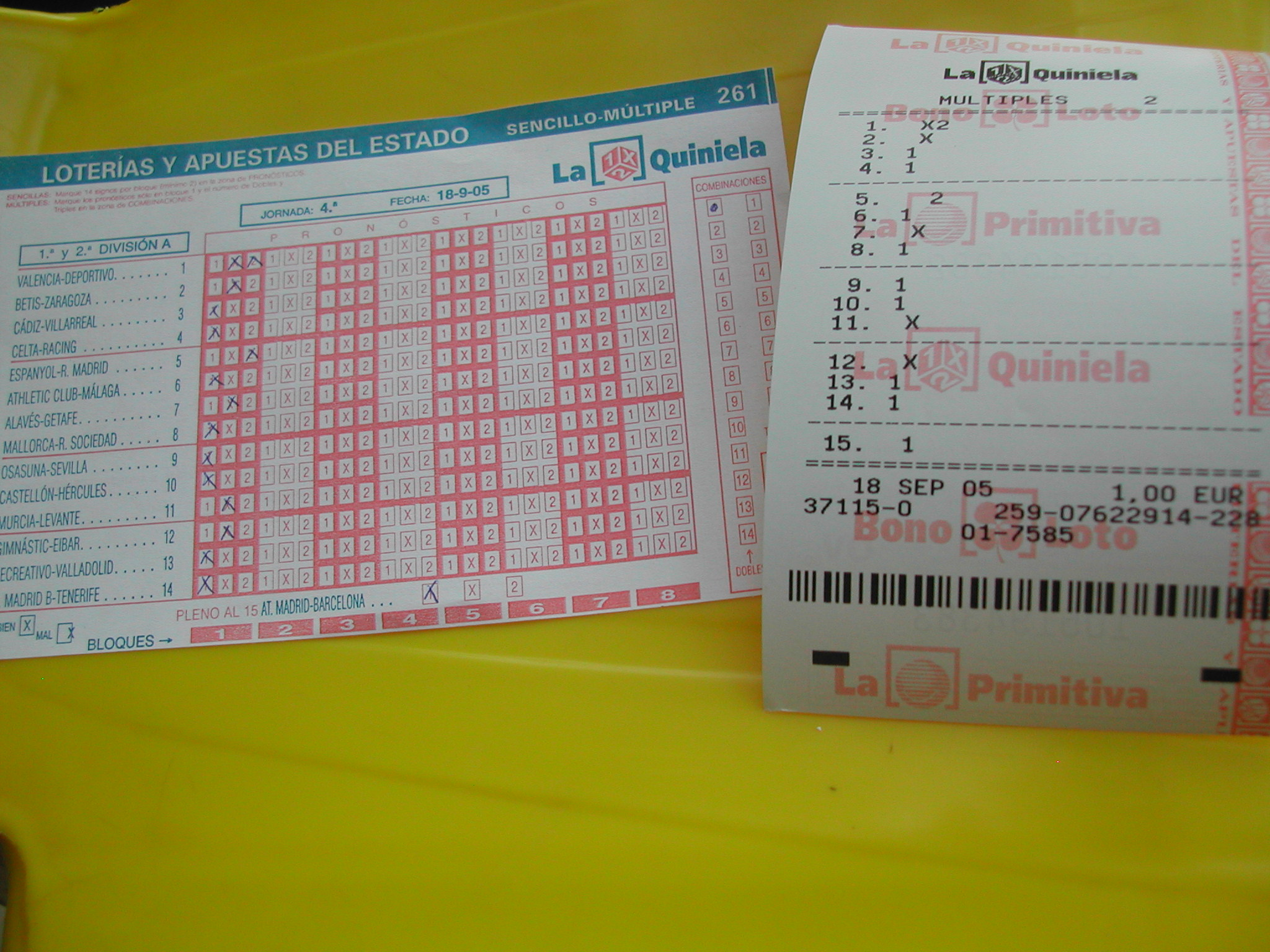 Mi quiniela Quiniela de Atalaya y notas de fútbol. He puesto un x2 en el Valencia-Depor, porque había que hacer dos apuestas.